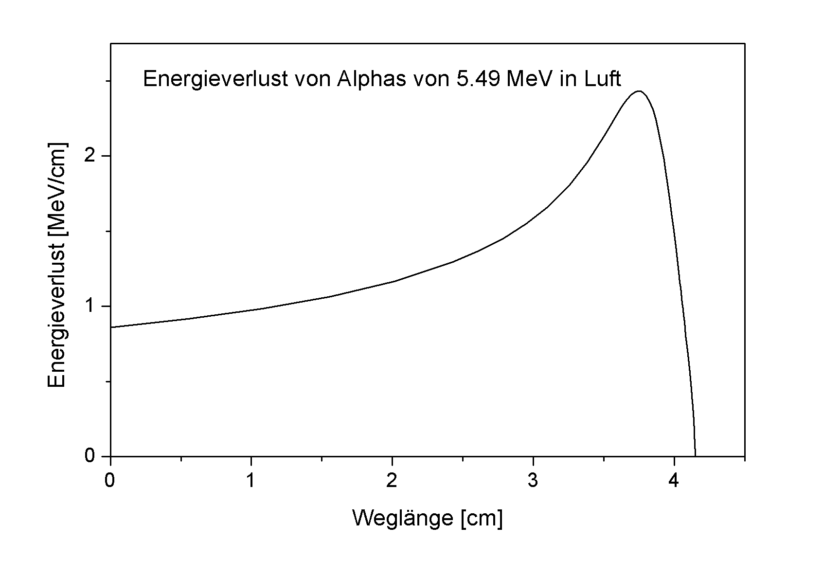 Braggkurve von Alphas in Luft